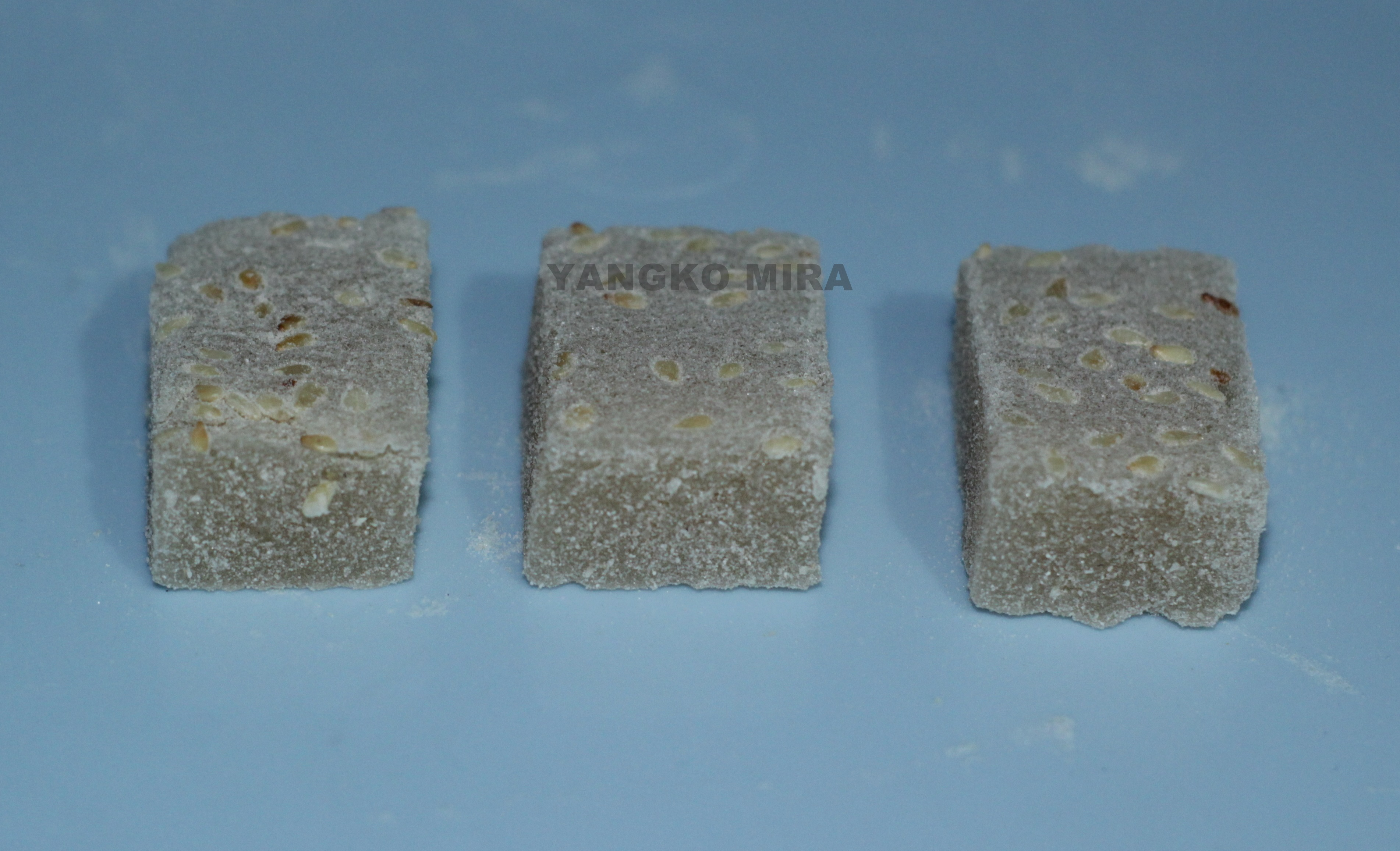 yangko mira rasa wijen